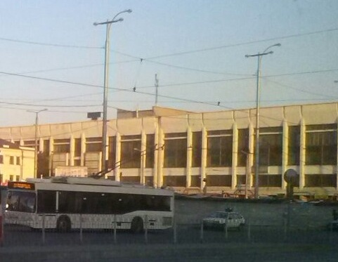 Тролейбус Дніпро Т103 біля вокзалу Запоріжжя І